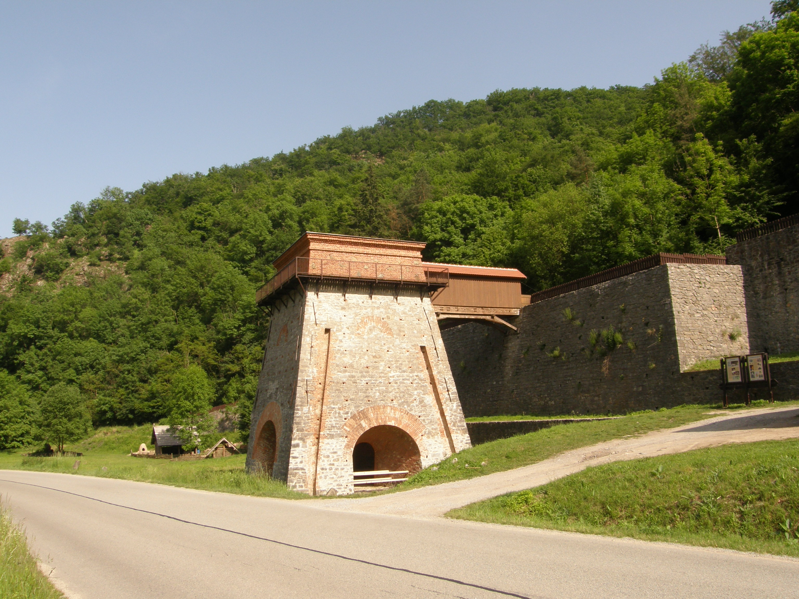 Stará huť u Adamova